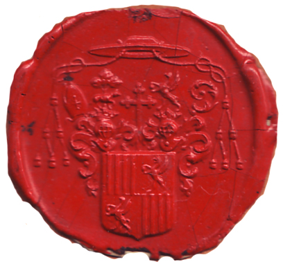 Osobní pečeť biskupa Antona Ernsta Schaffgotsche; cca r. 1842